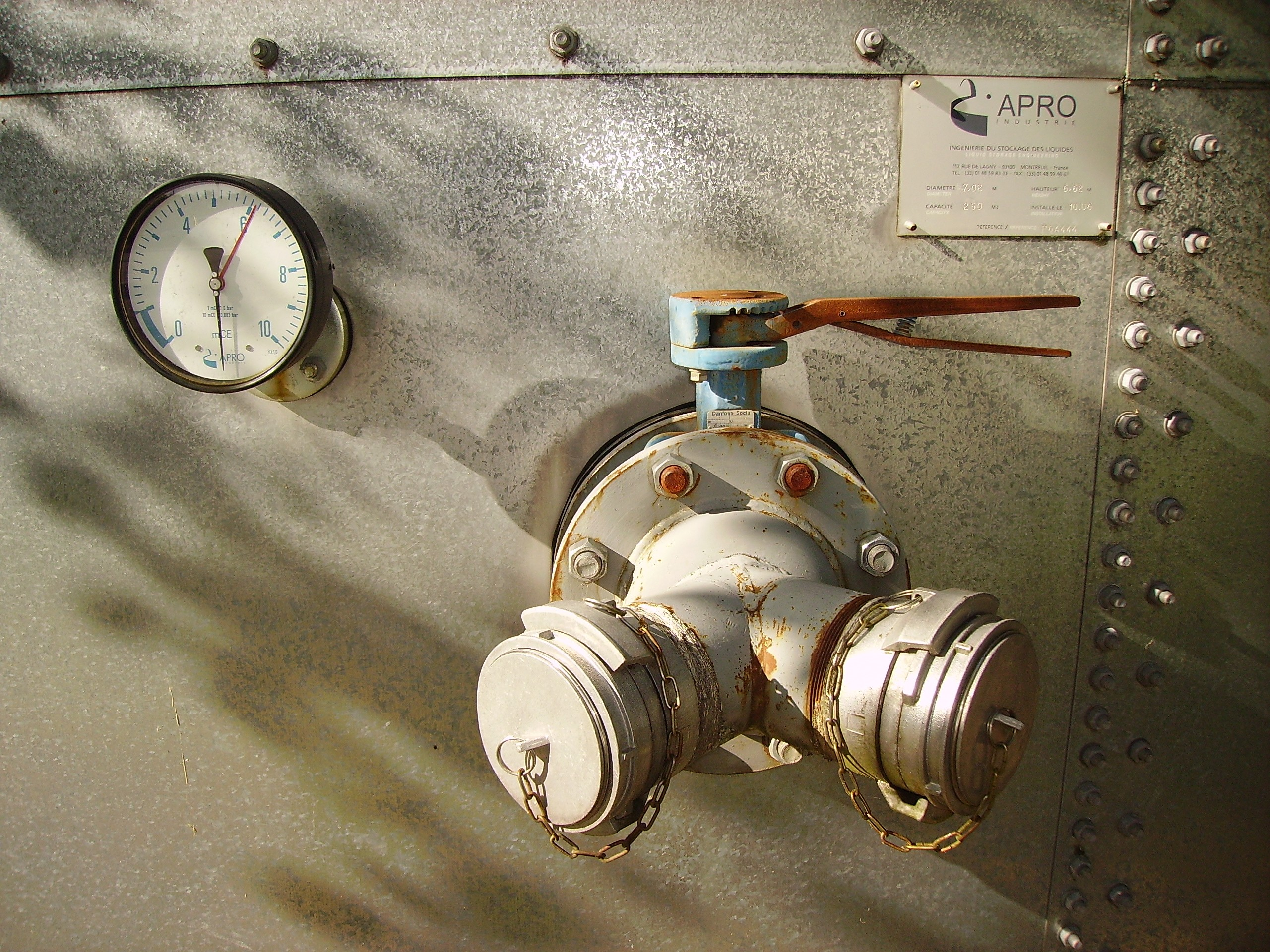 Réservoir pompier métallique boulonné : jauge de niveau d'eau et nourrice d'aspiration (avec vanne Danfoss Socla et deux raccords).